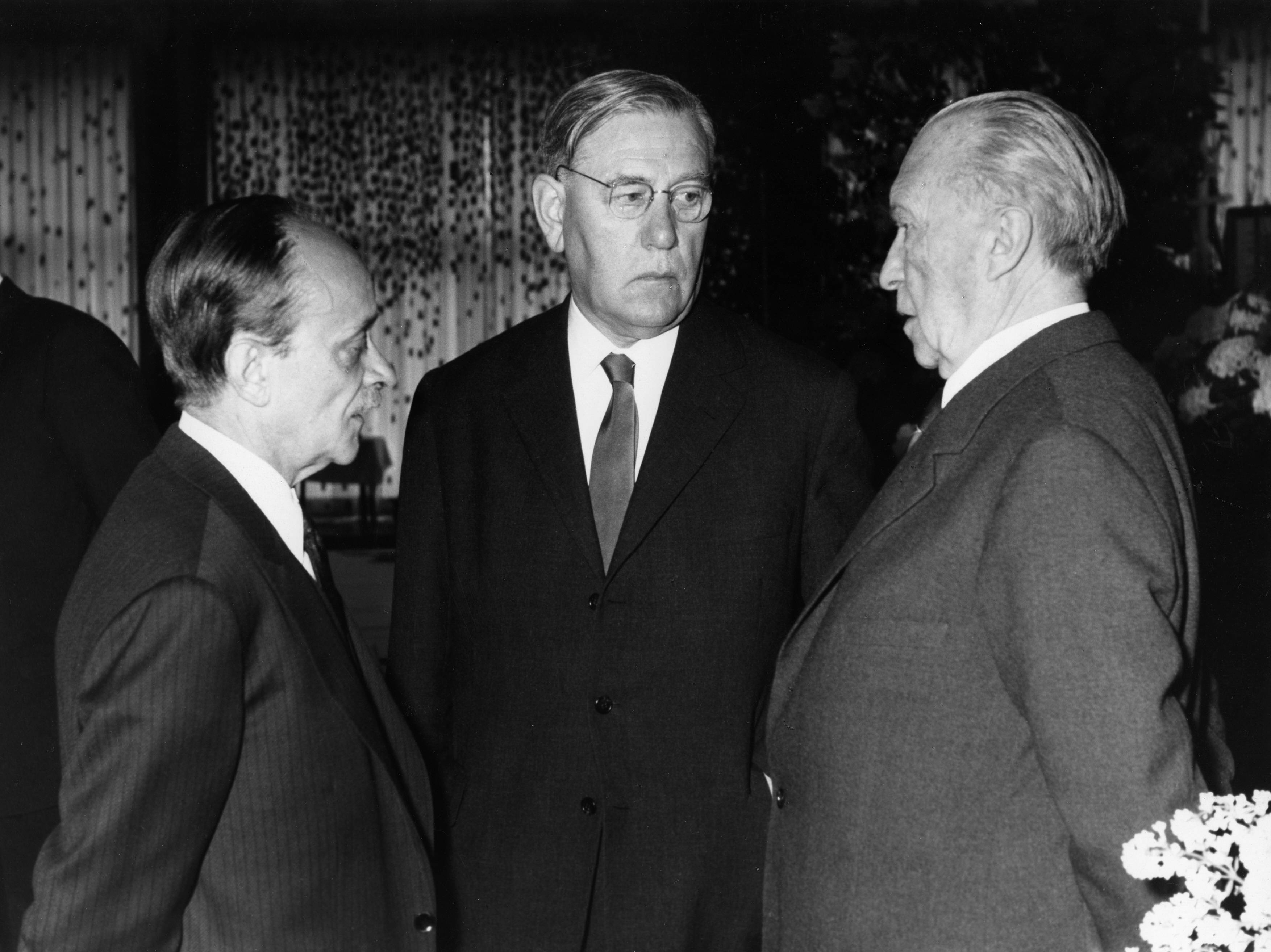 Adenauer, Konrad9. CDU-Bundesparteitag, 26.04.1960 - 29.04.1960